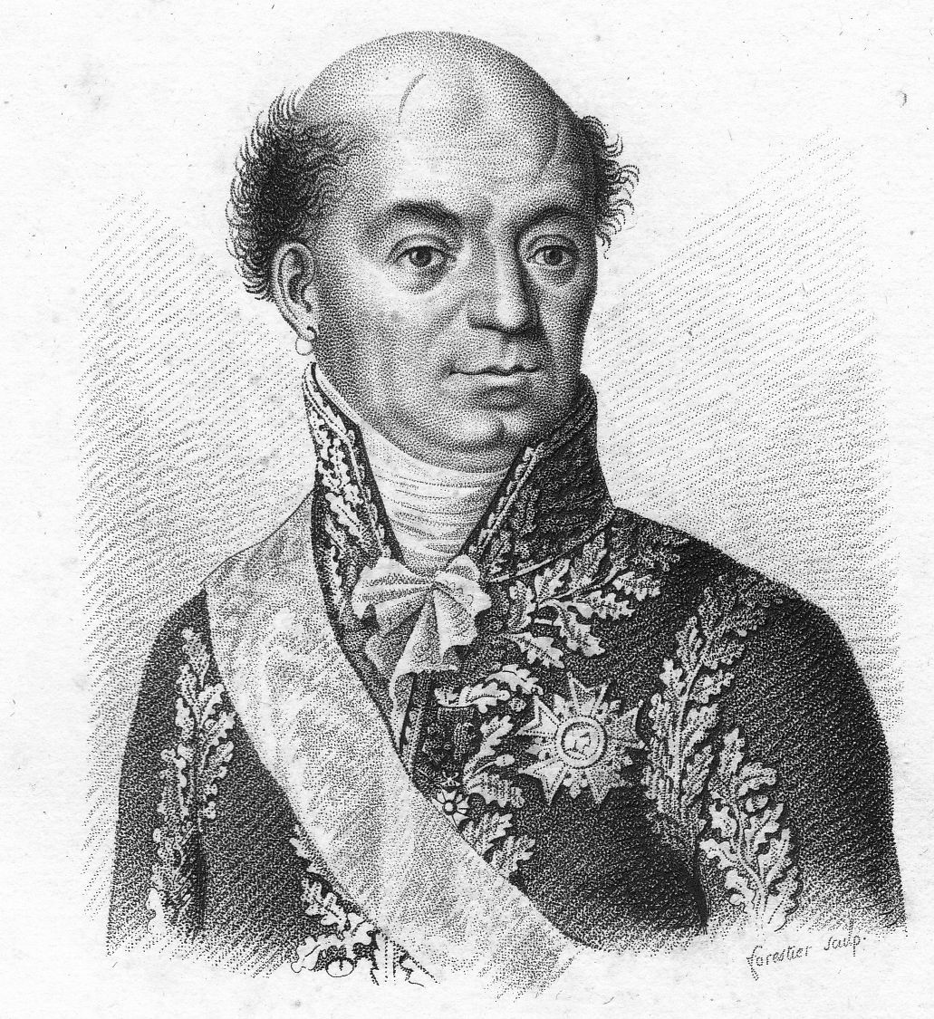 Cathérine-Dominique, marquis de Pérignon (1754–1818), französischer Revolutionsgeneral; Marschall und Pair von Frankreich